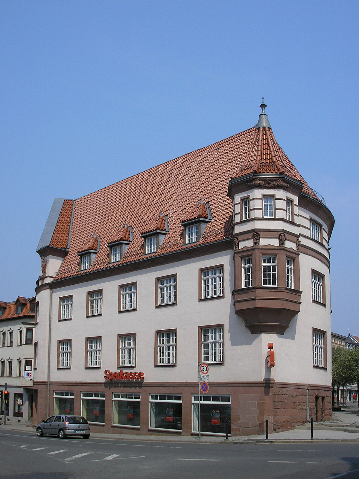 Sparkasse von Apolda (Thüringen).